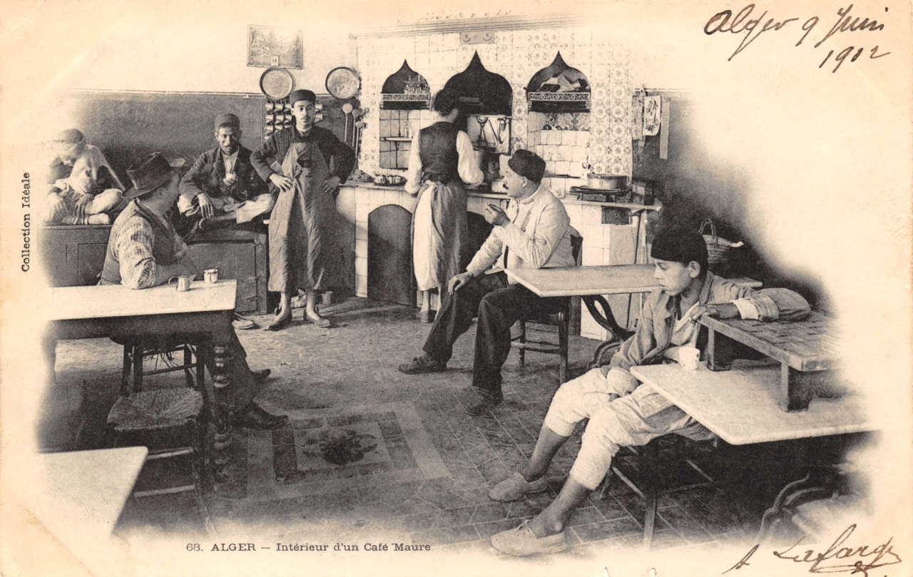 Carte postale ancienne : café maure, Alger, 1902